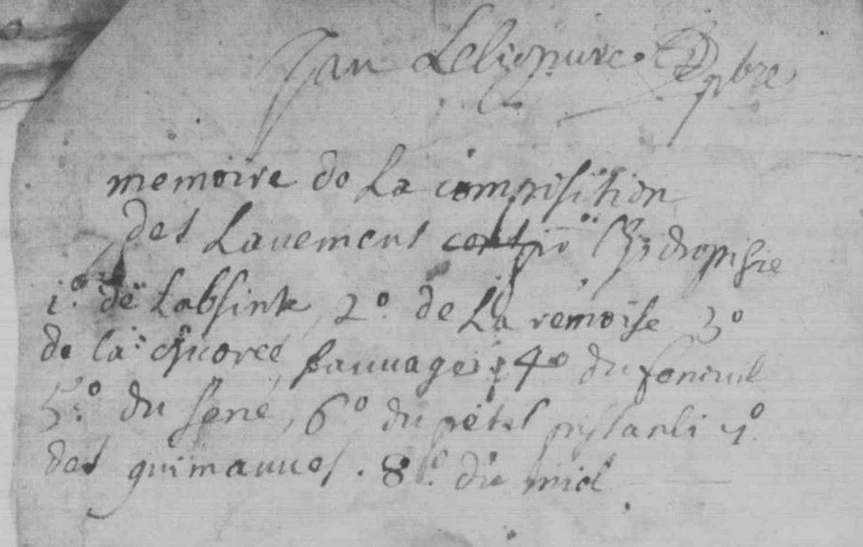 Recette de lavement rédigée par le prêtre de Mouzeil en 1668 (page 1).